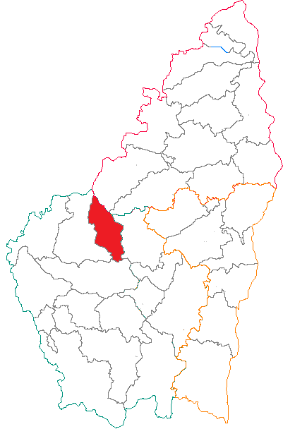 Situation du canton dans le département de l'Ardèche (France)